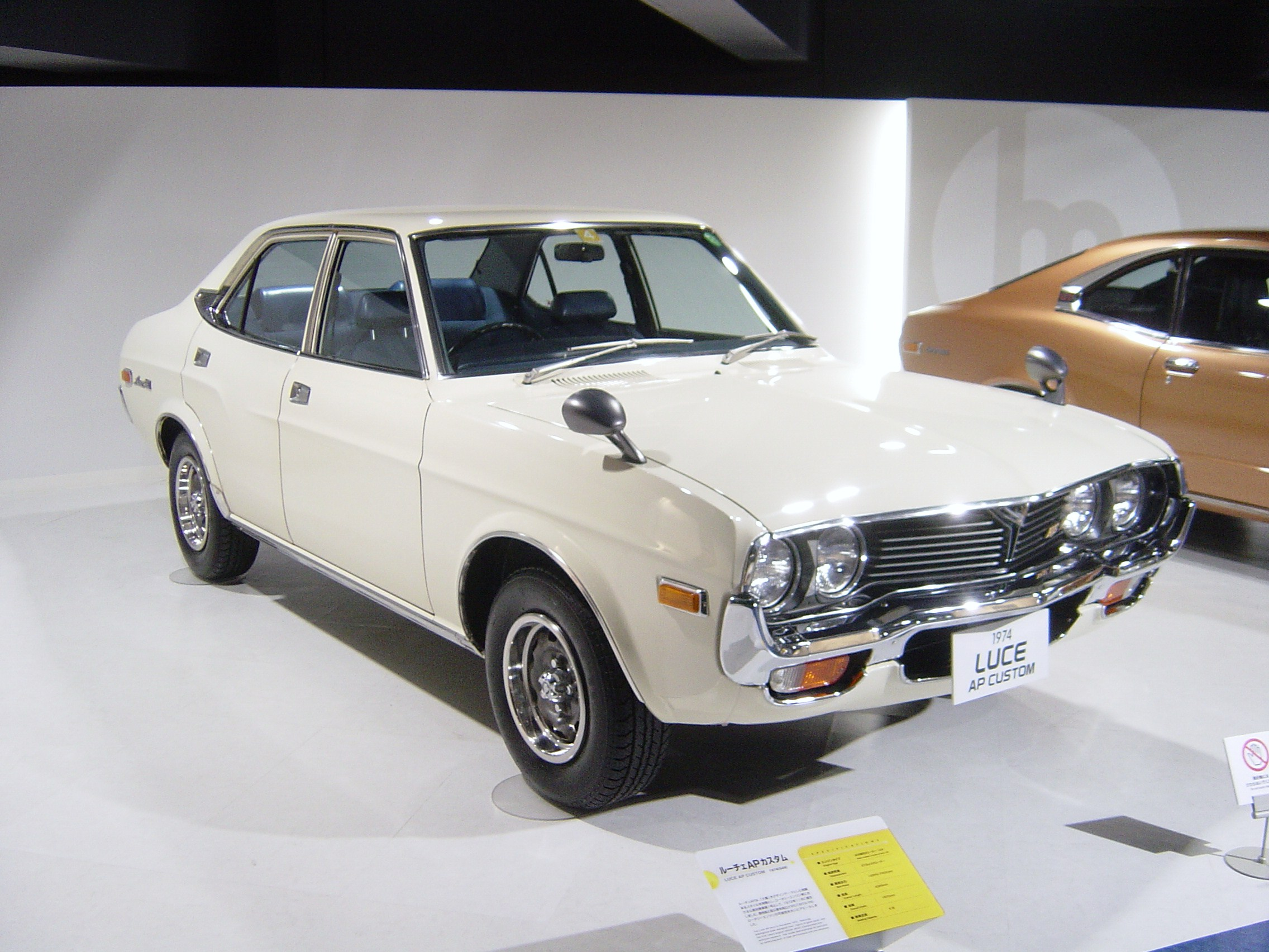 Mazda Luce(マツダ・ルーチェ),Mazda Museum